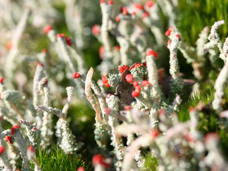 Rotfrüchtige Säulenflechte (Cladonia macilenta)